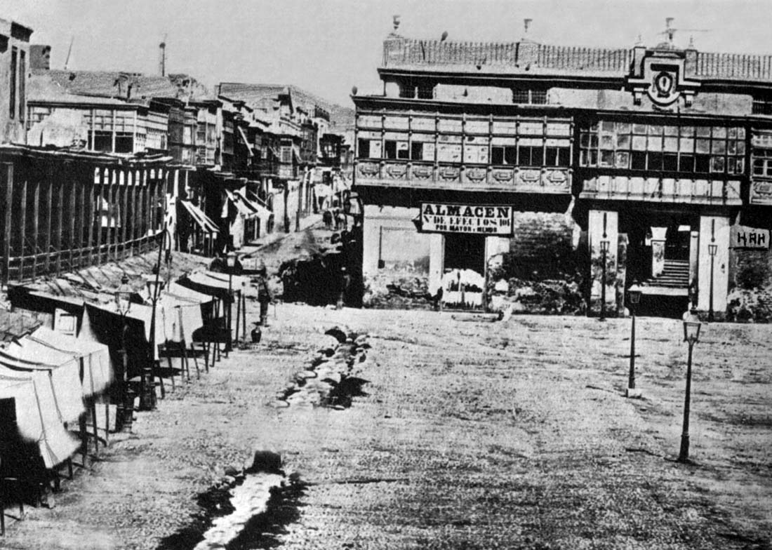 Vista parcial del Palacio de Gobierno del Perú, a la izquierda con tenduchos de mercachifles, Plaza Mayor de Lima y antiguo Palacio Arzobispal en 1860.